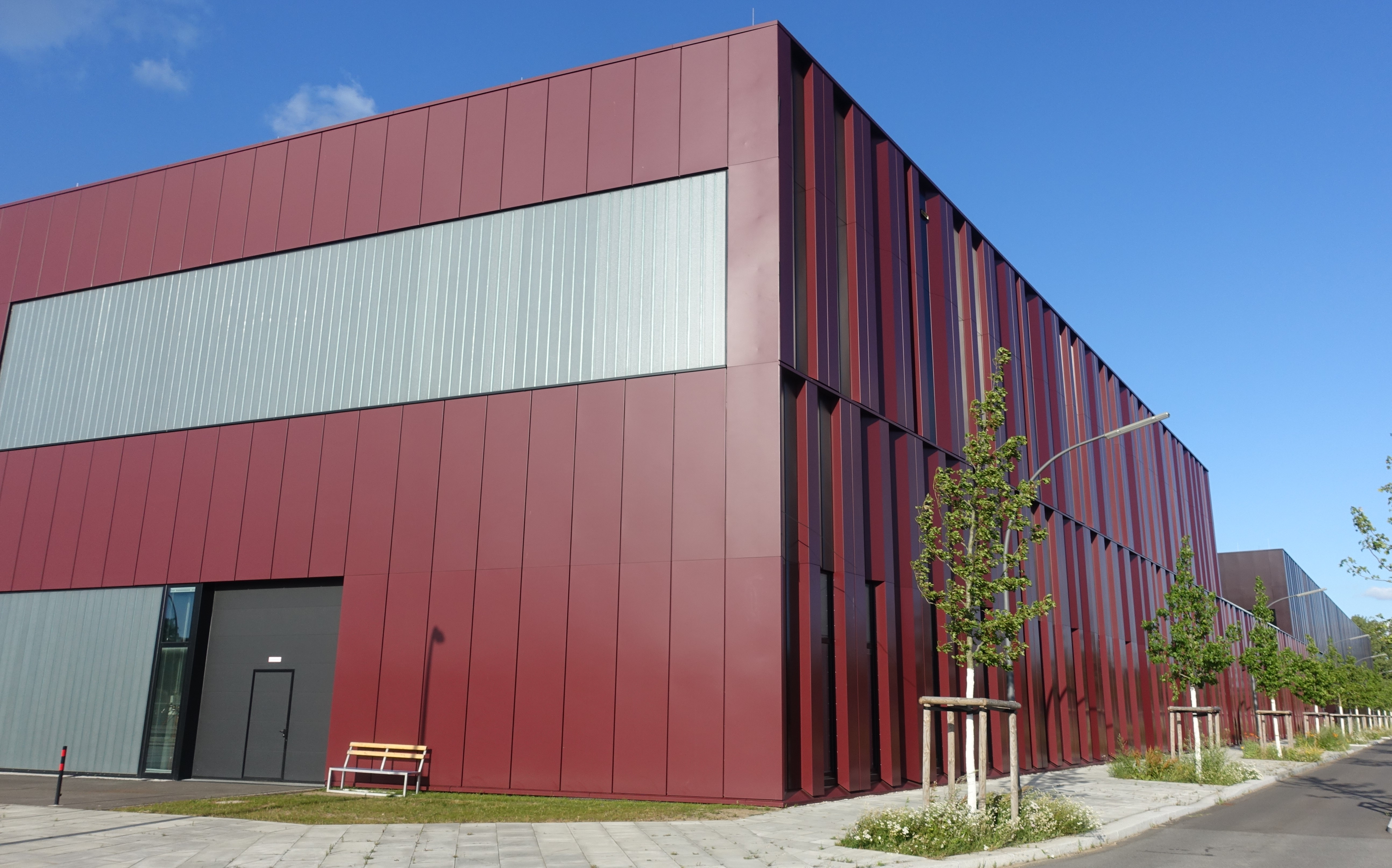 Werkstätten der Hamburger Staatsoper in Hamburg-Rothenburgsort auf dem Gelände des neuen Huckepackbahnhofs